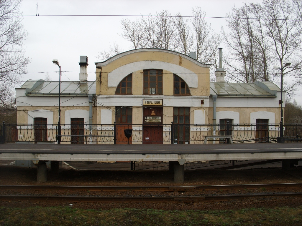 Вокзал на ст. Горелово